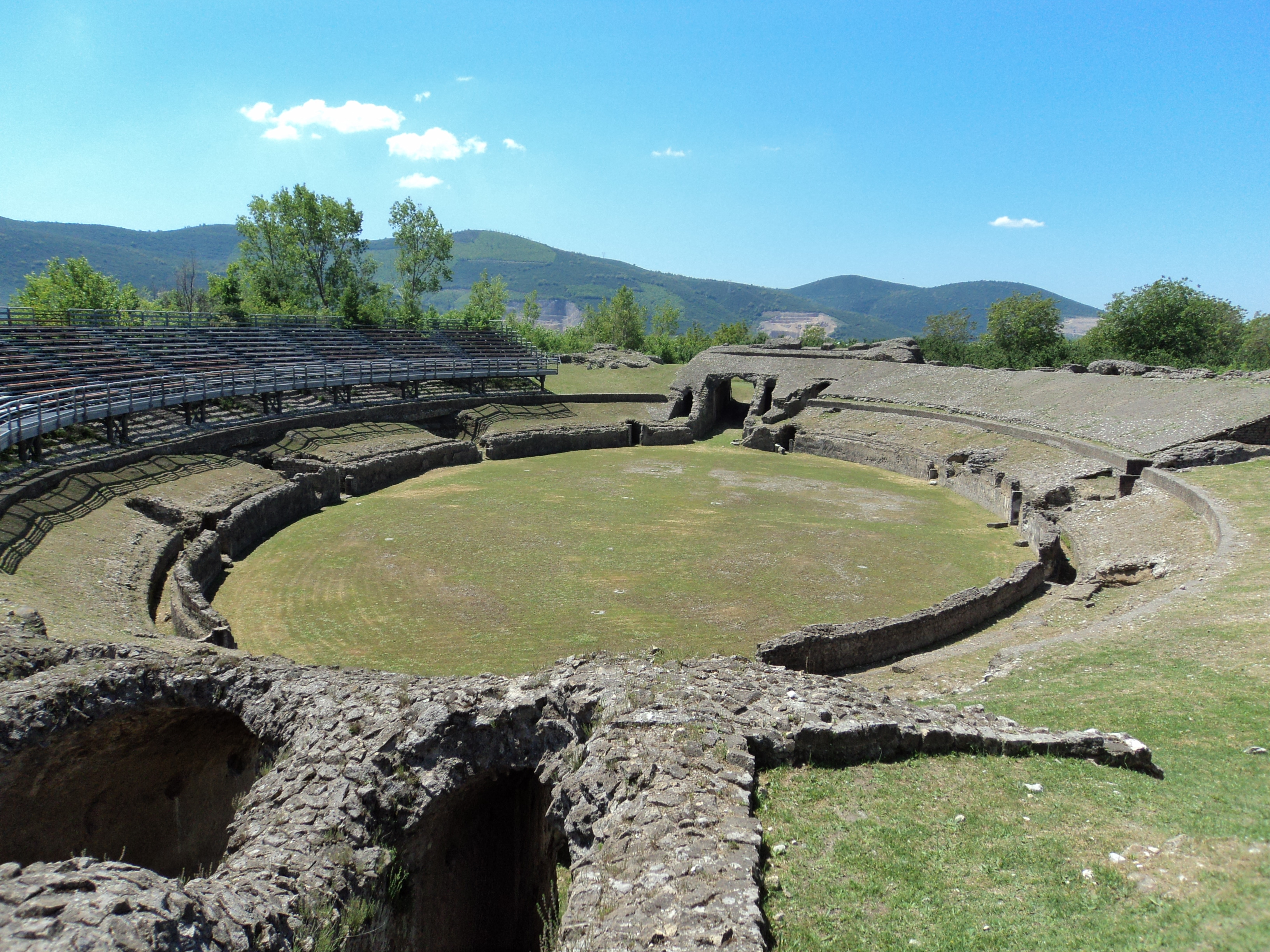 Area archeologica dell'Anfiteatro di Avella - MIBAC This is a photo of a monument which is part of cultural heritage of Italy.